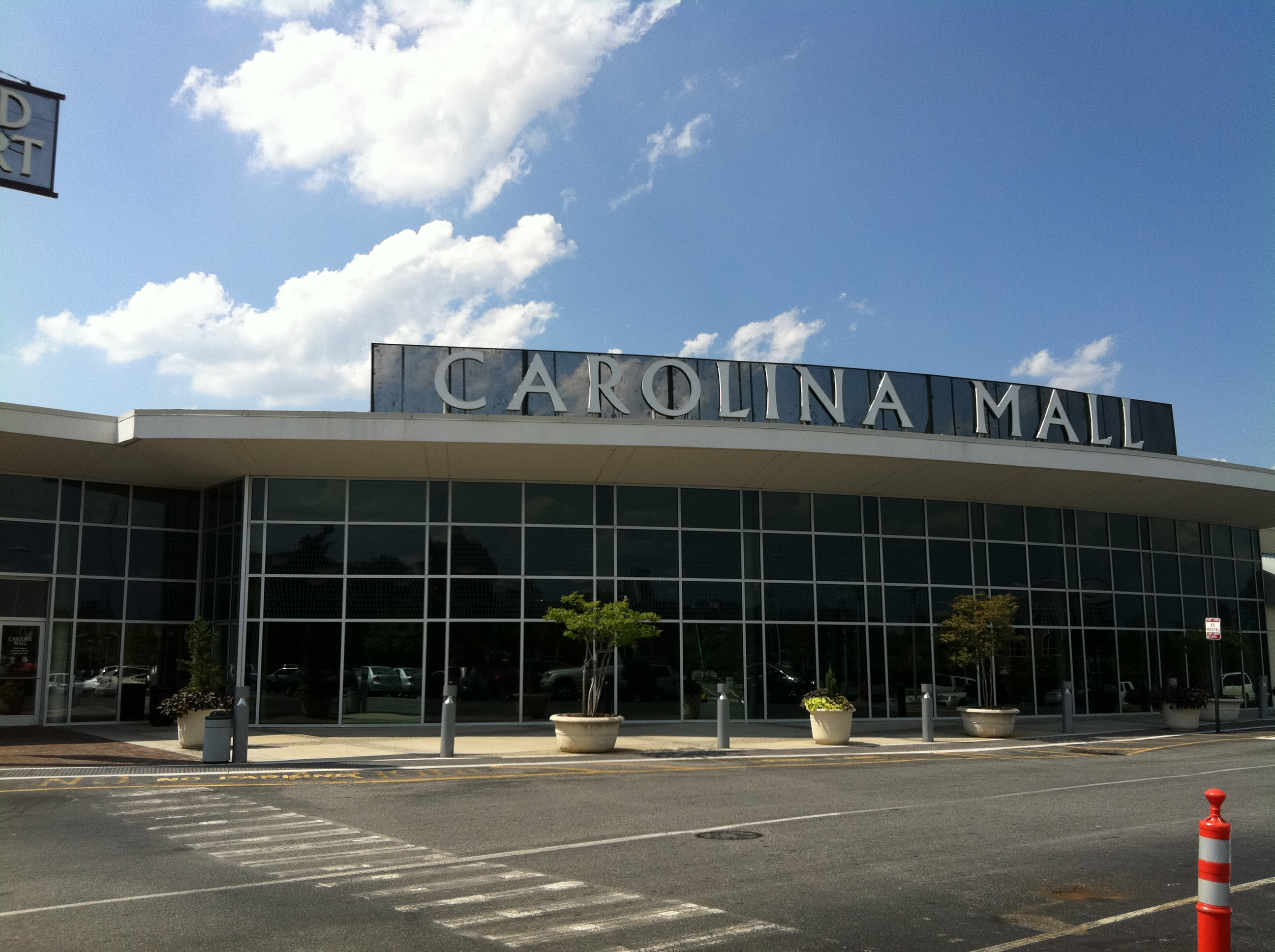 Carolina Mall - Concord, NC